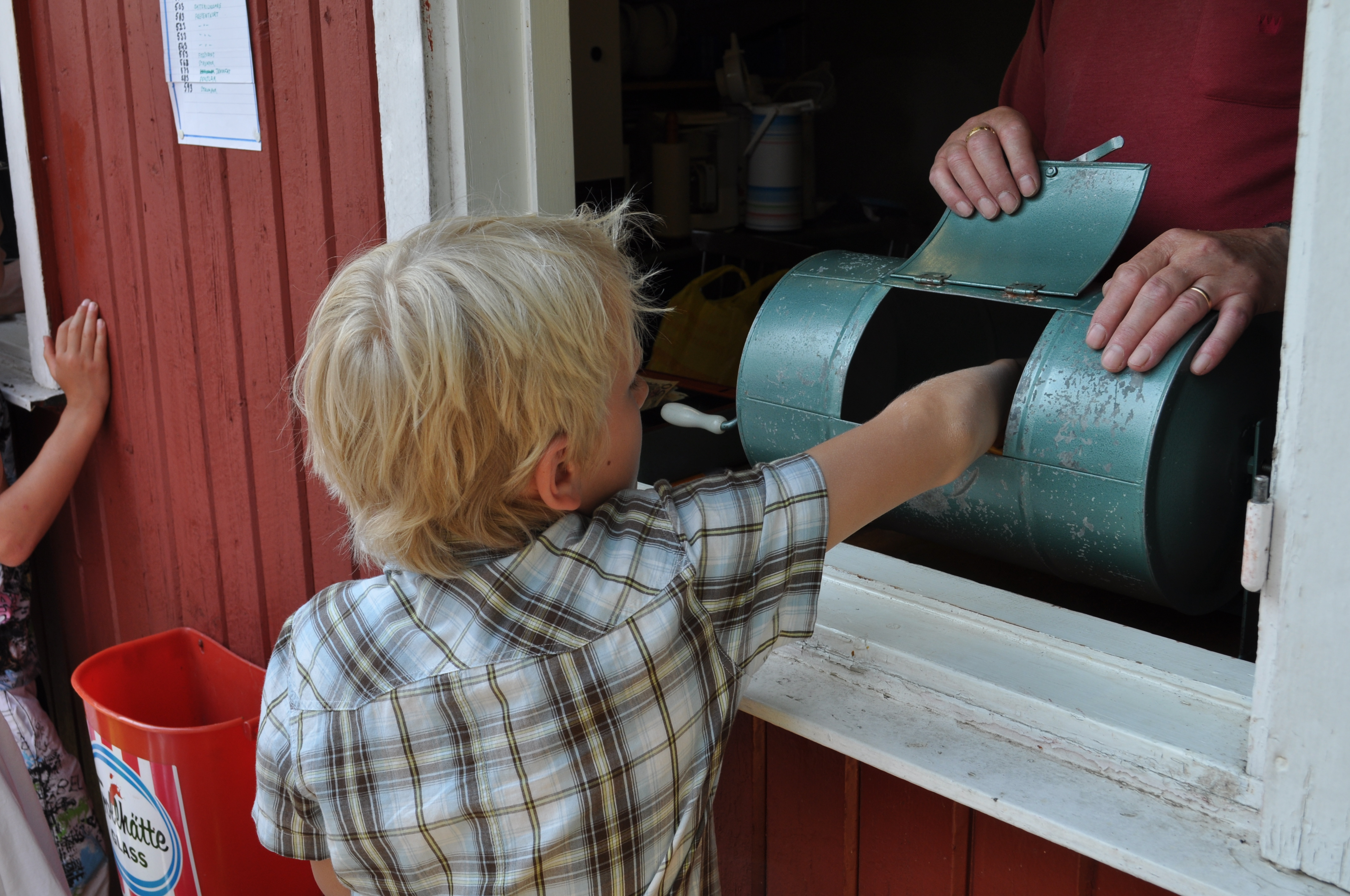 Waldemar tar ett antal lotter men vinner inget. Linus däremot kom hem med en kaffekokare :-)